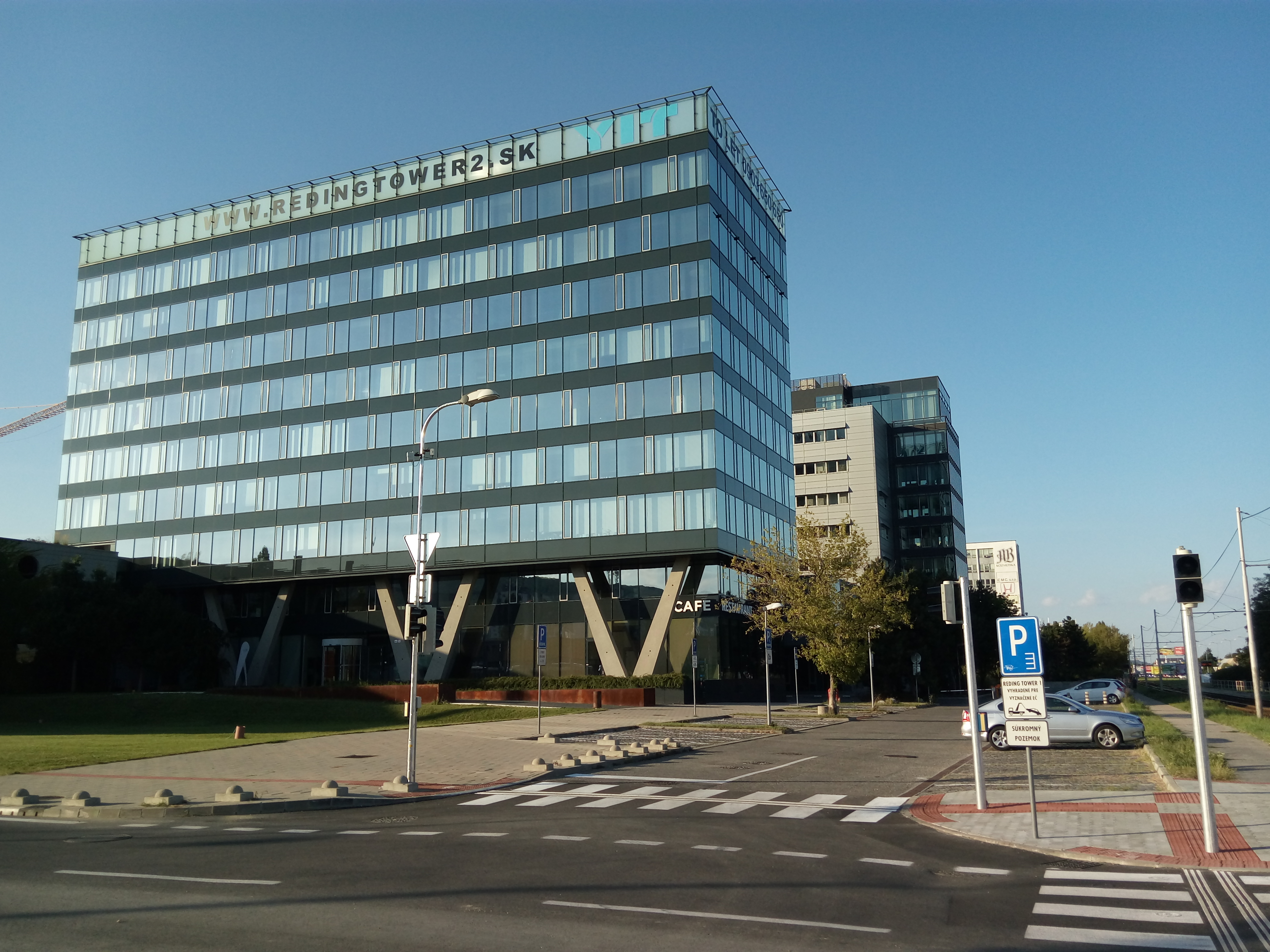 Reding Tower, Račianska, Rača, Bratislava